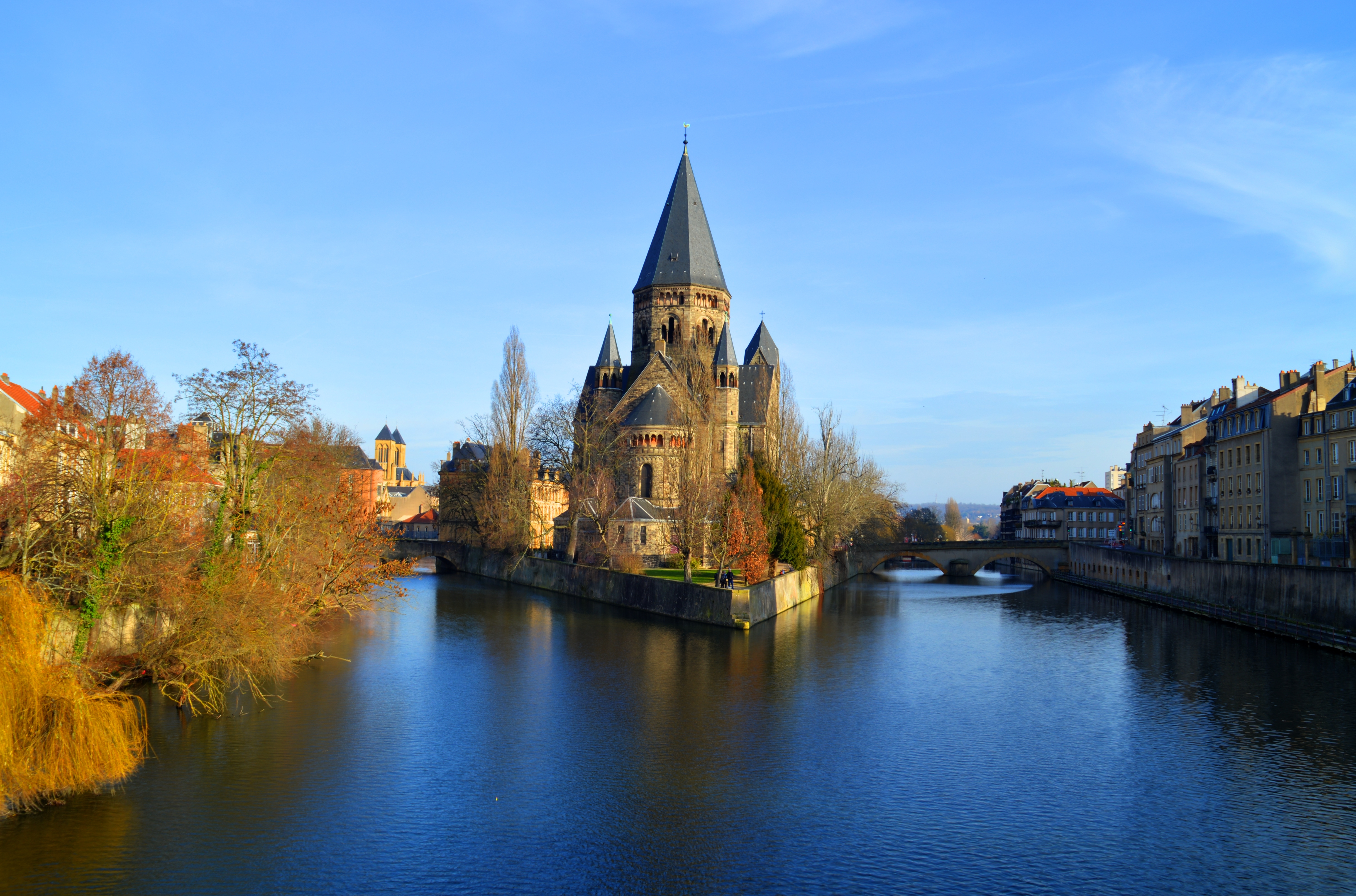 Temple Neuf de Metz und Pont (Brücke) des Roches